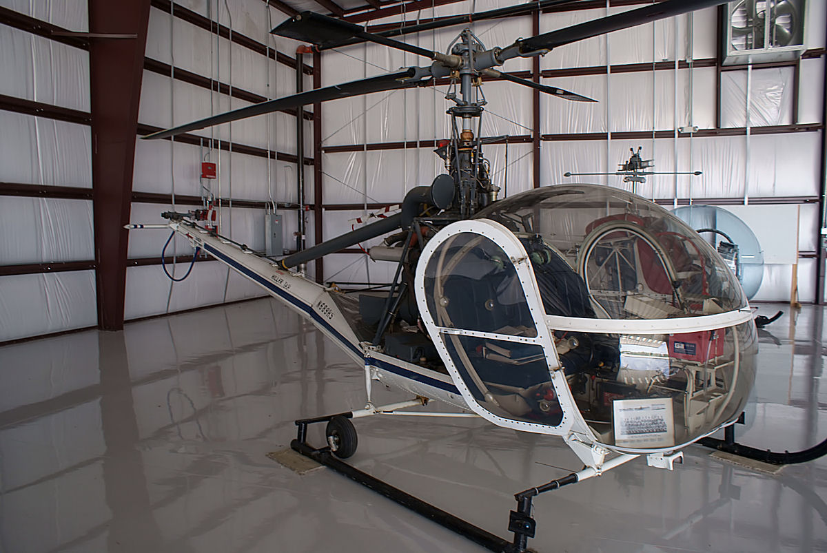 Hiller_UH-12D_RSideFront_KAM_11Aug2010